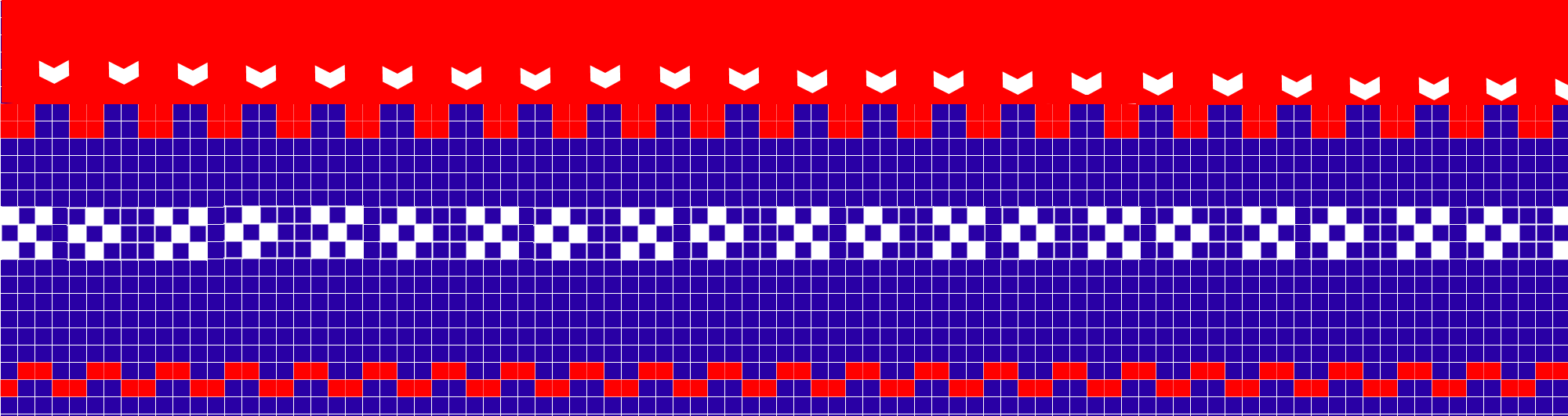 Motif tricot norvégien, modèle Mariusgenser